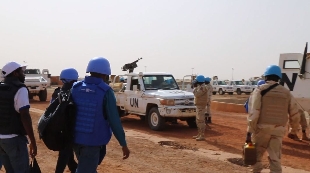 Casques bleus burkinabés de la MINUSMA à Ber, au Mali, en janvier 2017. 1